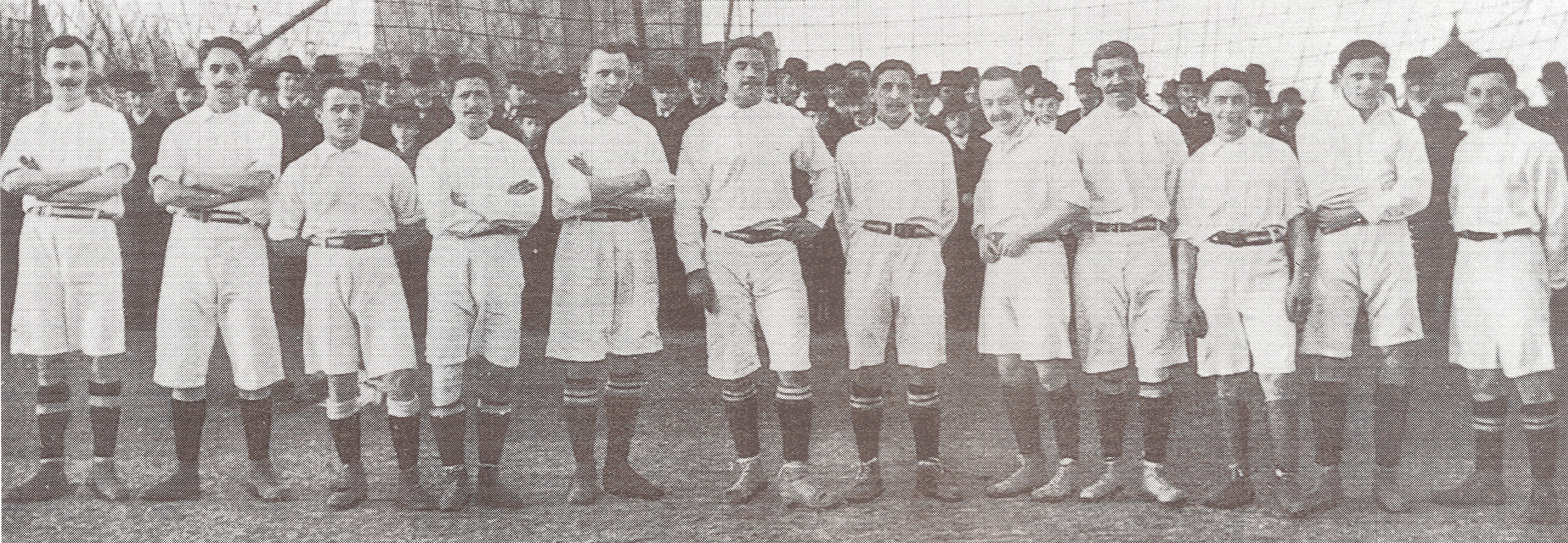 Der deutsche Fußballmeister 1908, Berliner Thor- und Fußball-Club Viktoria 1889. Mannschaftsfoto vom Endspiel 1908 gegen Stuttgarter Kickers. V.l.n.r.: Willi Hahn, Reinh. Bock, Otto Pauke, Willi Moeck, Paul Fischer, Willi Worpitzky, Paul Hunder, Otto Dumke, Paul Scranowitz, Helmut Röpnack, Willi Knesebeck, A. Röpnack.